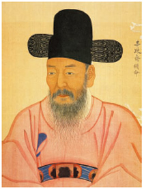 이이명의 초상화